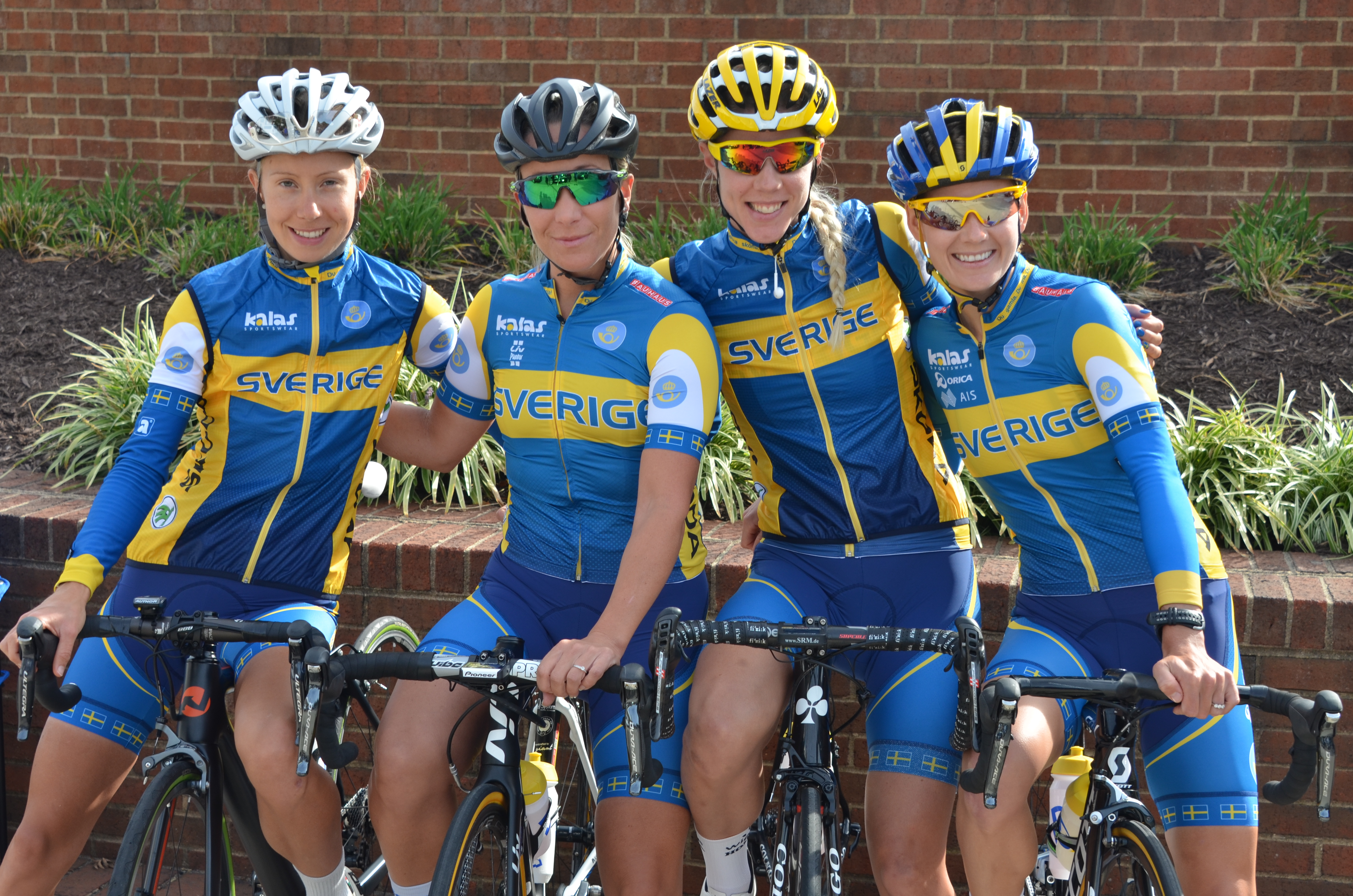 Den svenska damtruppen under Cykel-VM 2015 i Richmond, Virginia. Från vänster: Hanna Nilsson, Saara Mustonen, Emilia Fahlin och Emma Johansson.